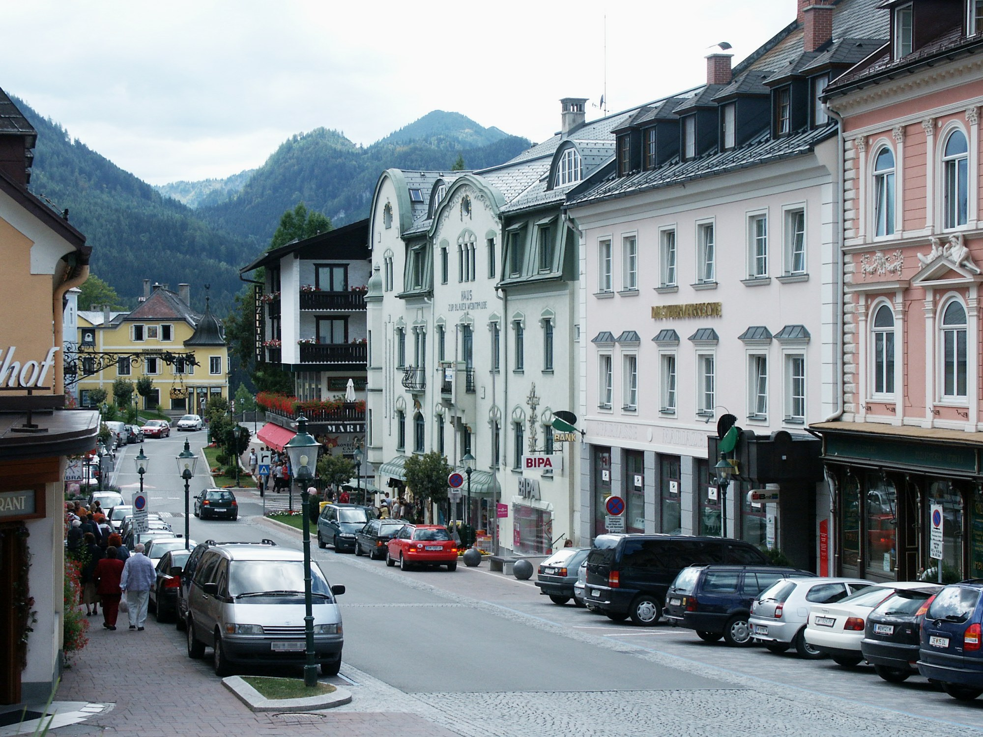 Description: Grazer Straße in Mariazell, Styria - Die Grazer Straße in Mariazell, Steiermark